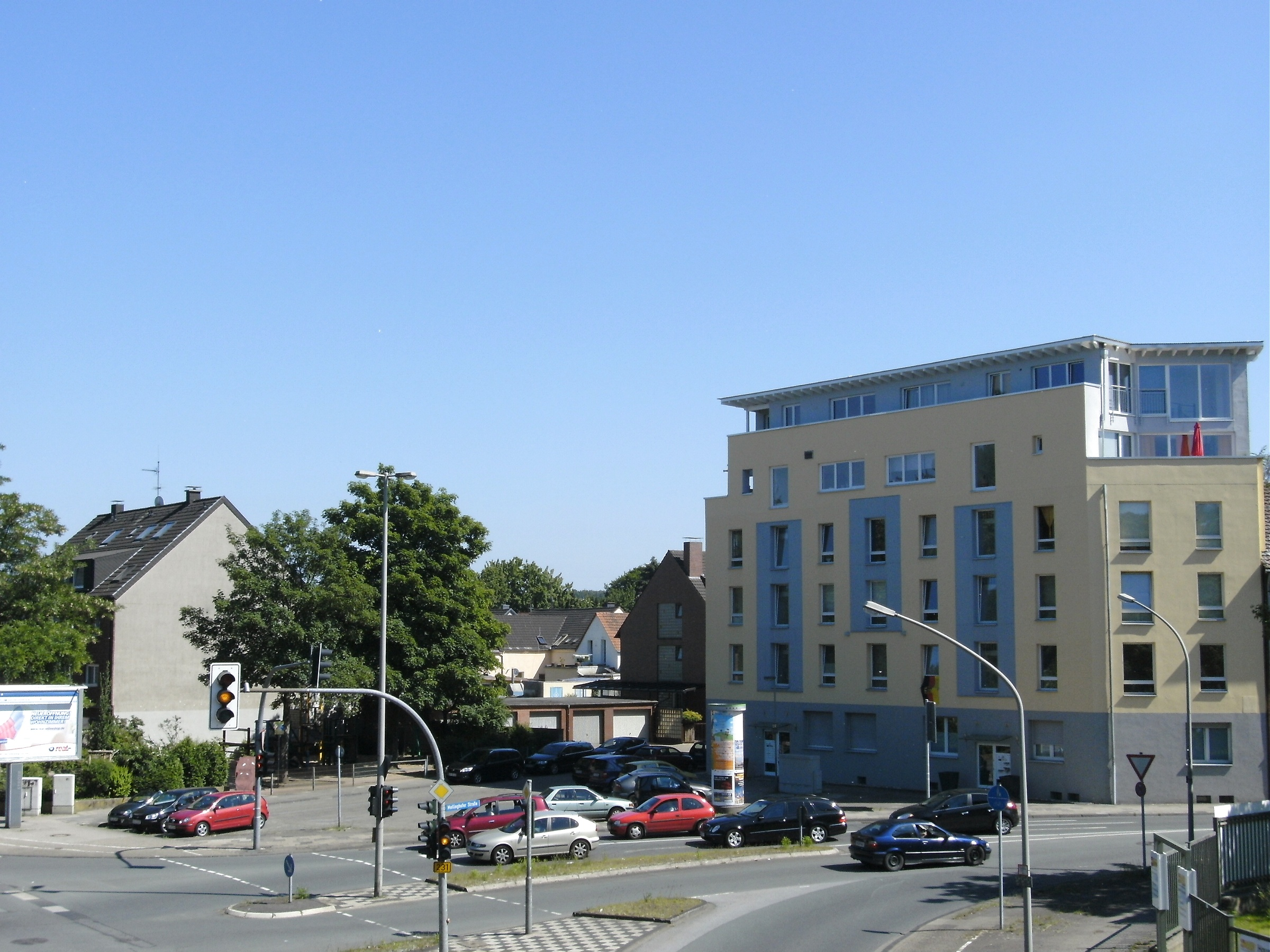 Ecke Essener und Mellinghofer Straße in Oberhausen (Rhld.)